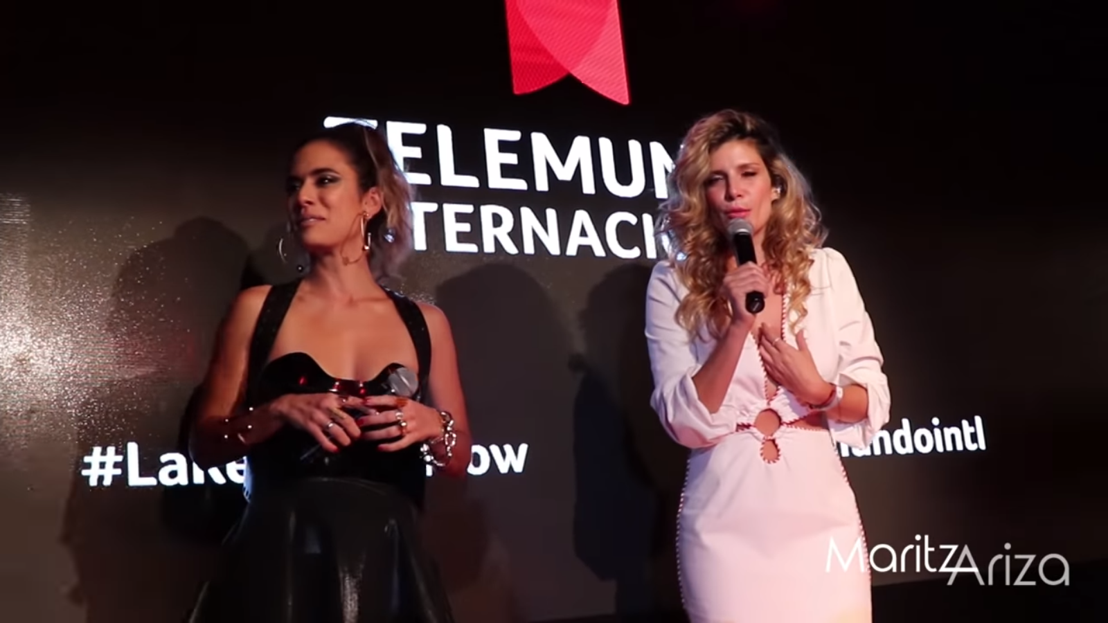 Carolina Ramírez y Mabel Moreno en lanzamiento internacional de La Reina del Flow para Telemundo Internacional